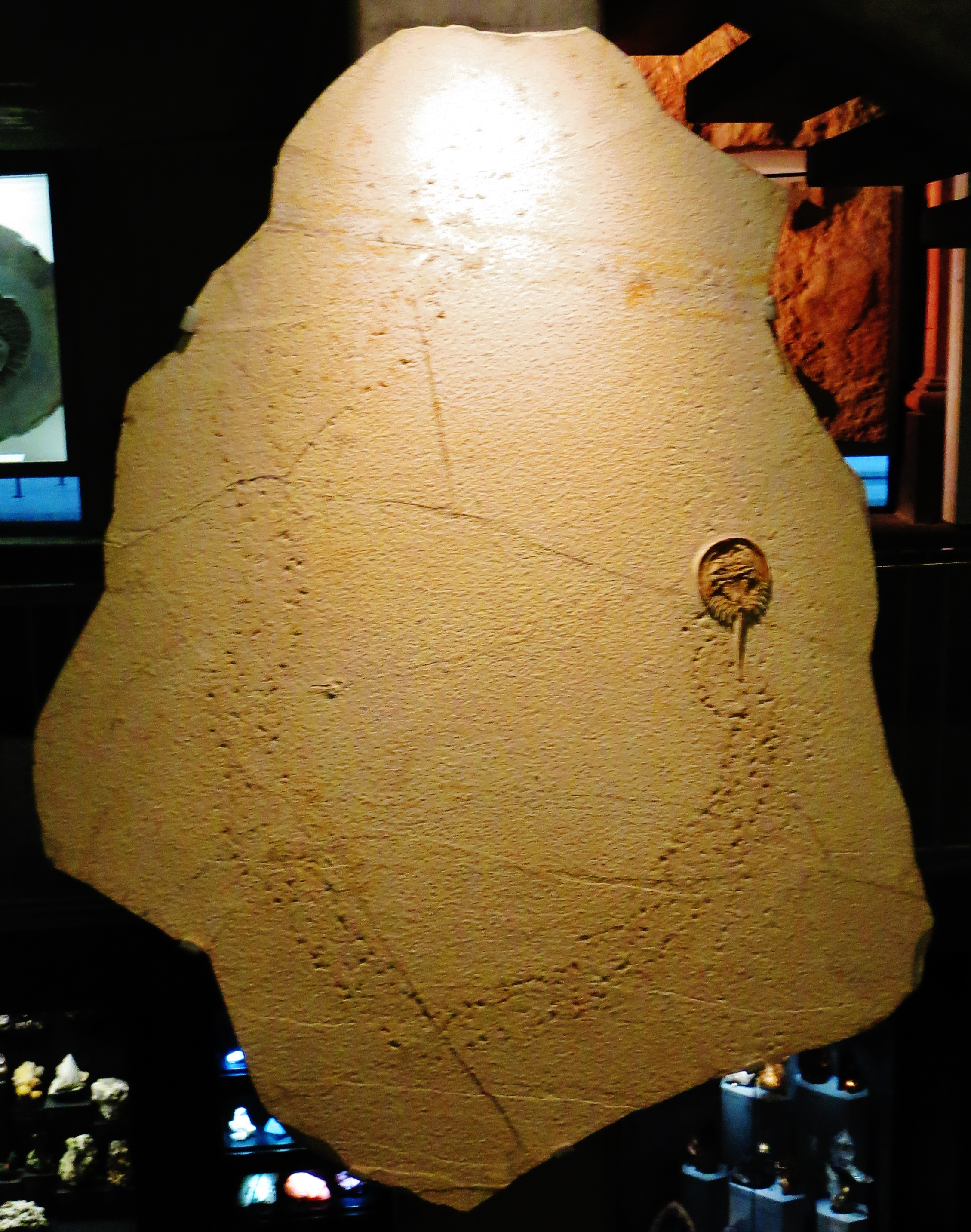 Took the picture at Senckenberg Museum, Frankfurt